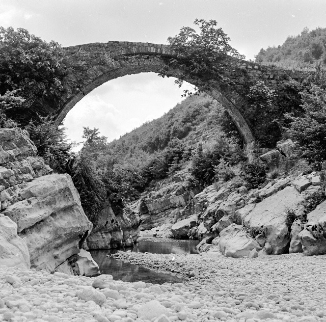 Il ponte Fabio Massimo sul fiume Titerno, presso Faicchio, in una foto del 1970